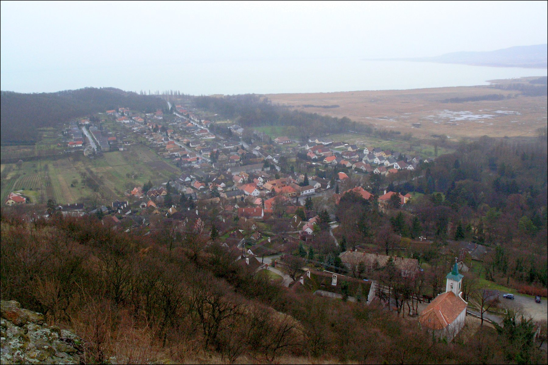 Szigliget